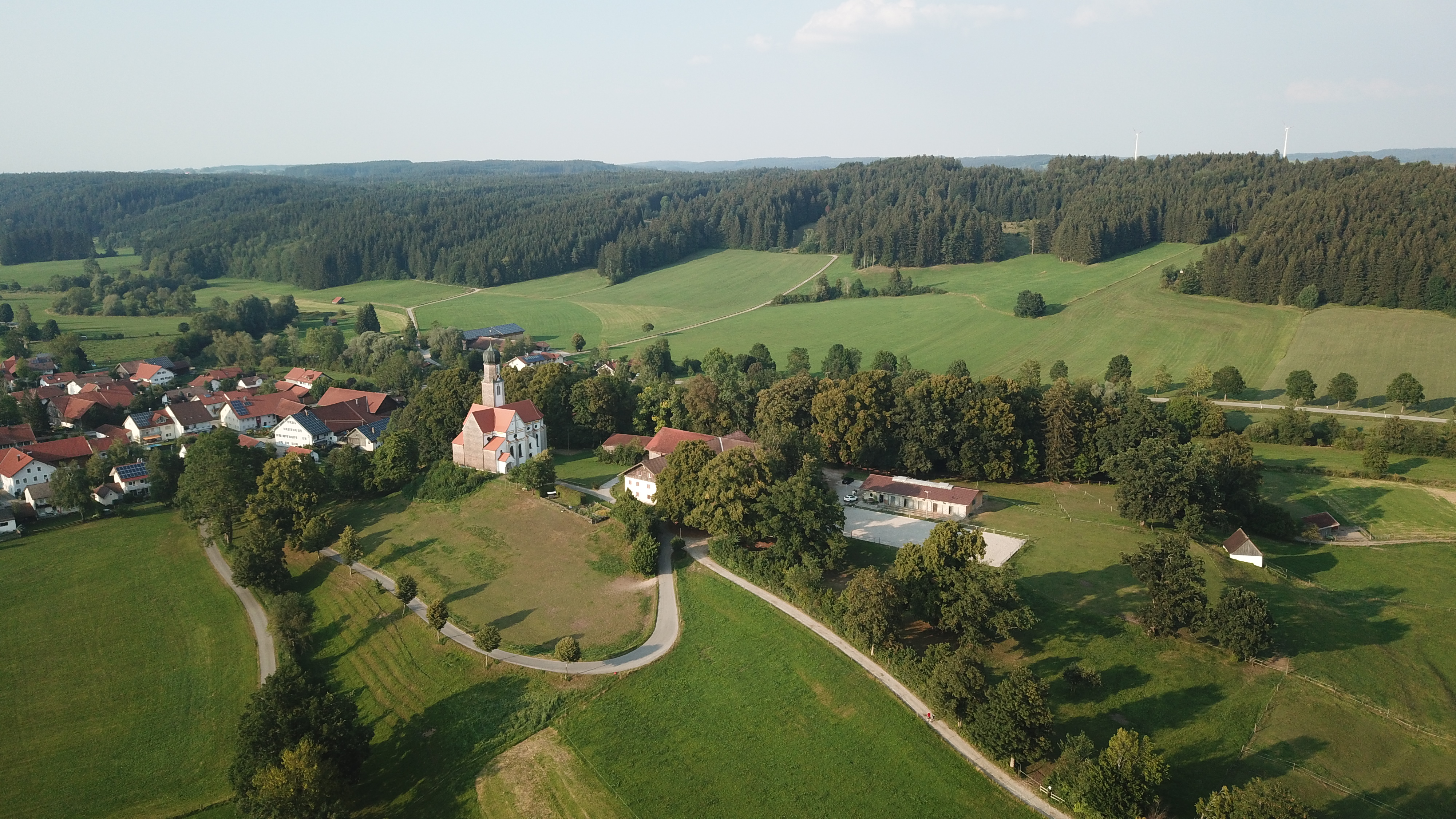 St. Ottilia Hörmannshofen